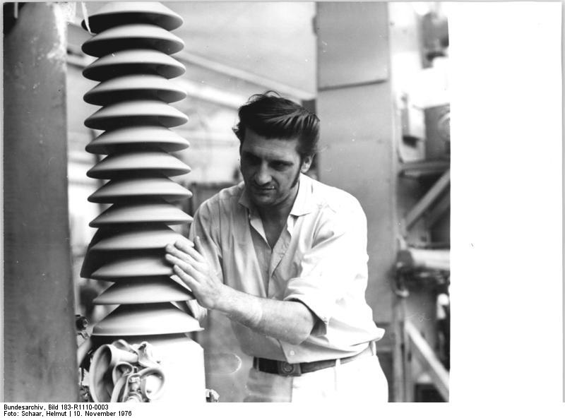 Industriearbeiter, Isolator ADN-ZB Schaar 10.11.1976 Bez. Suhl - Integration - Er trägt Mitverantwortung bei der Energieübertragung innerhalb der Staaten des RGW, denn die von ihm und seinen Kollegen im VEB Elektrokeramische Werke Sonneberg produzierten Isolierelemente kommen im Energieverbundsystem "Frieden" der RGW-Länder zum Einsatz. Die Isolatoren , die dort und auch bei der Transsibirischen Eisenbahn verwendet werden, tragen das Gütezeichen "Q". Günter Schinkmann leistet als ausgezeichneter Qualitätsarbeiter seinen Beitrag dabei. Er ist Aktivist und aktives Mitglied der Kampfgruppen der Arbeiterklasse. (vergl. dazu R1110-244N)